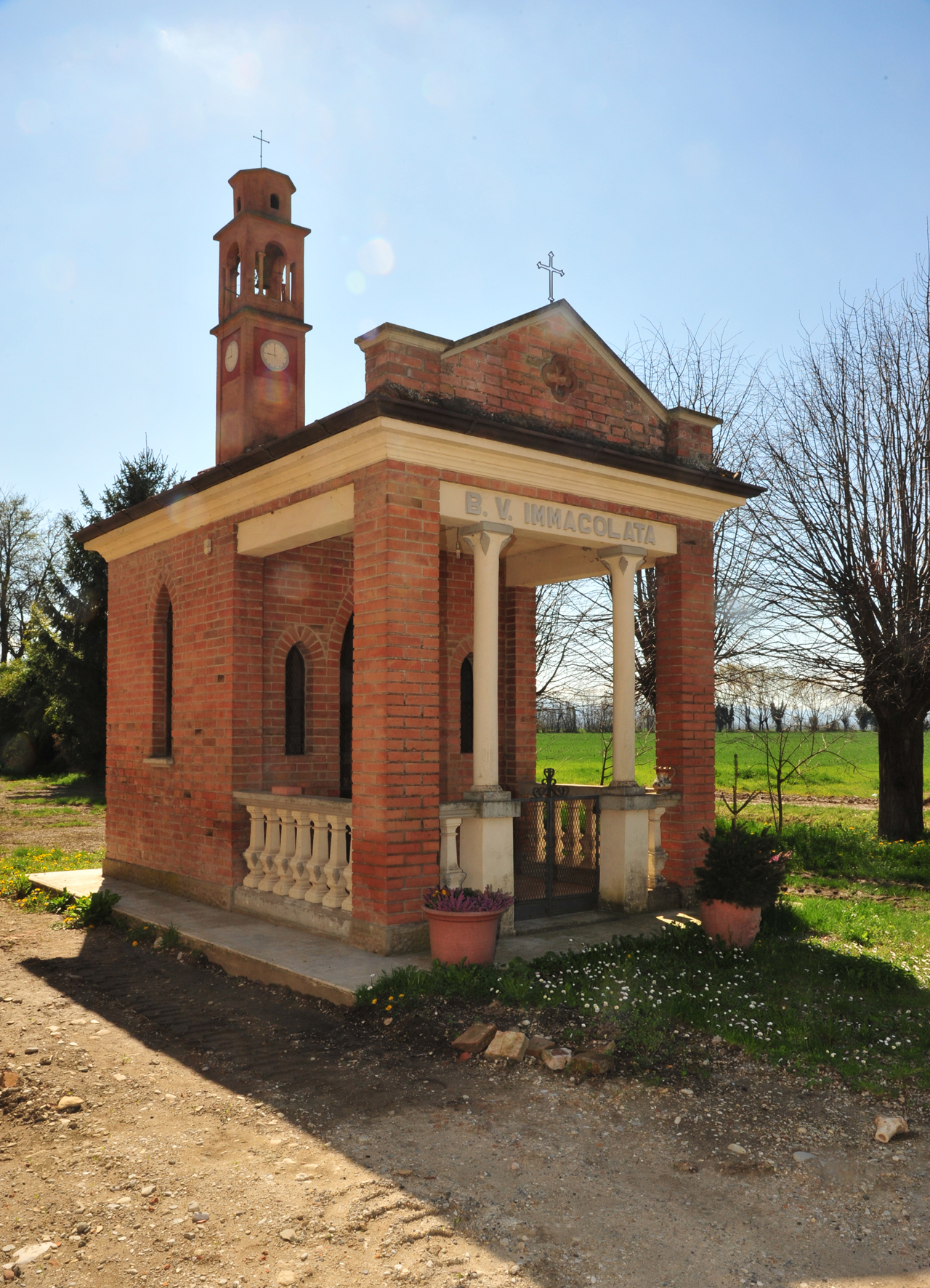 Loc Confine3